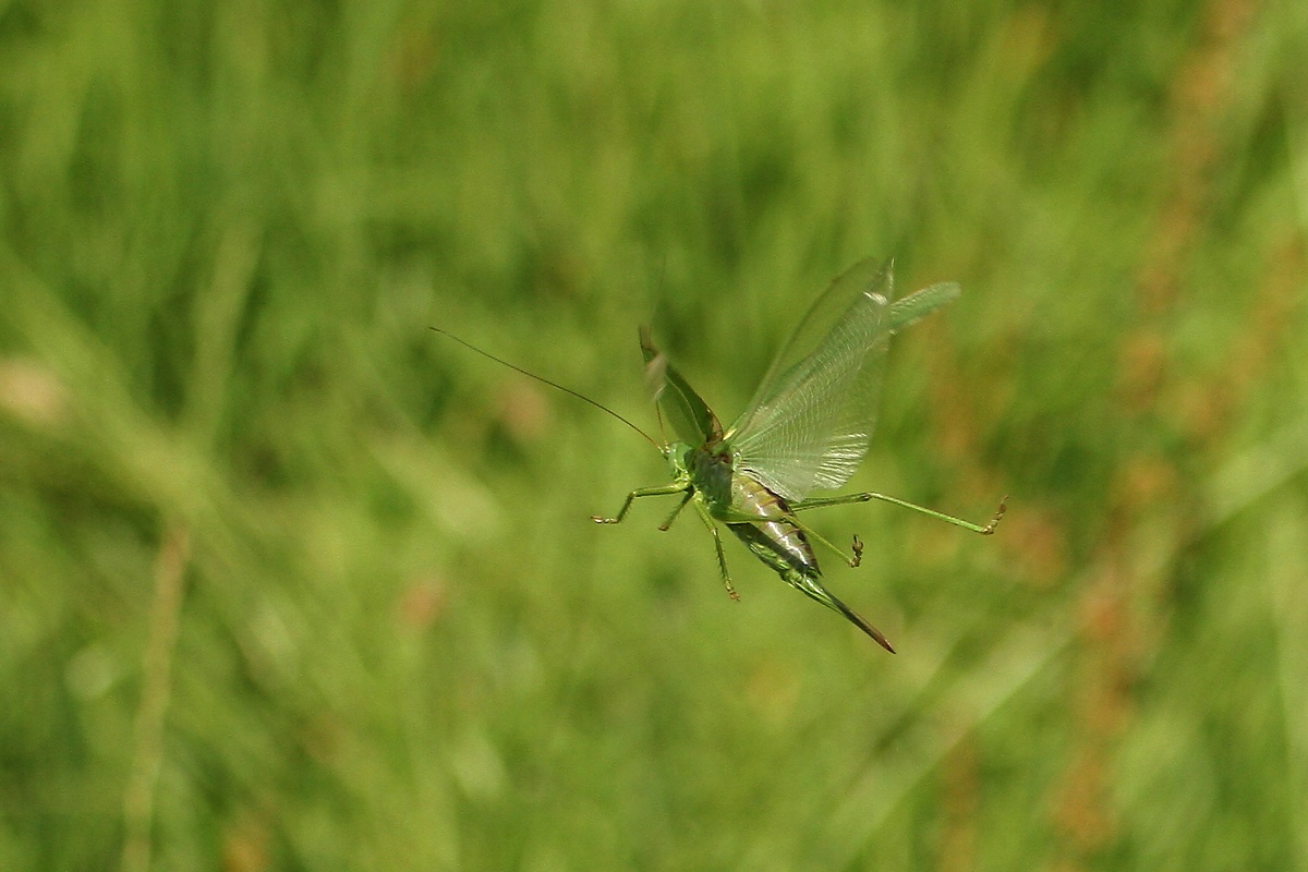 Grünes Heupferd.